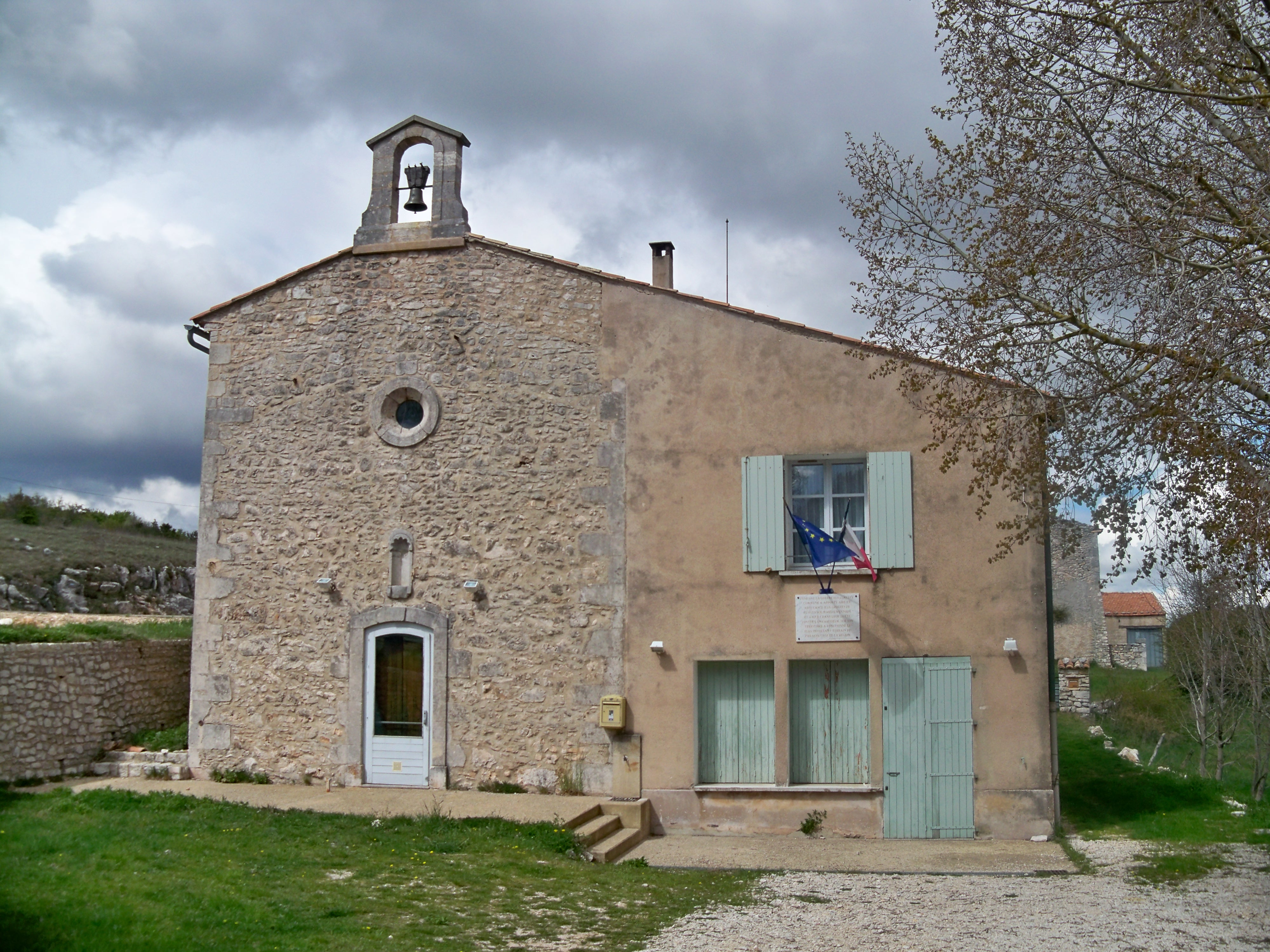 Mairie et église de Lagard d'Apt, Vaucluse, France Unknown